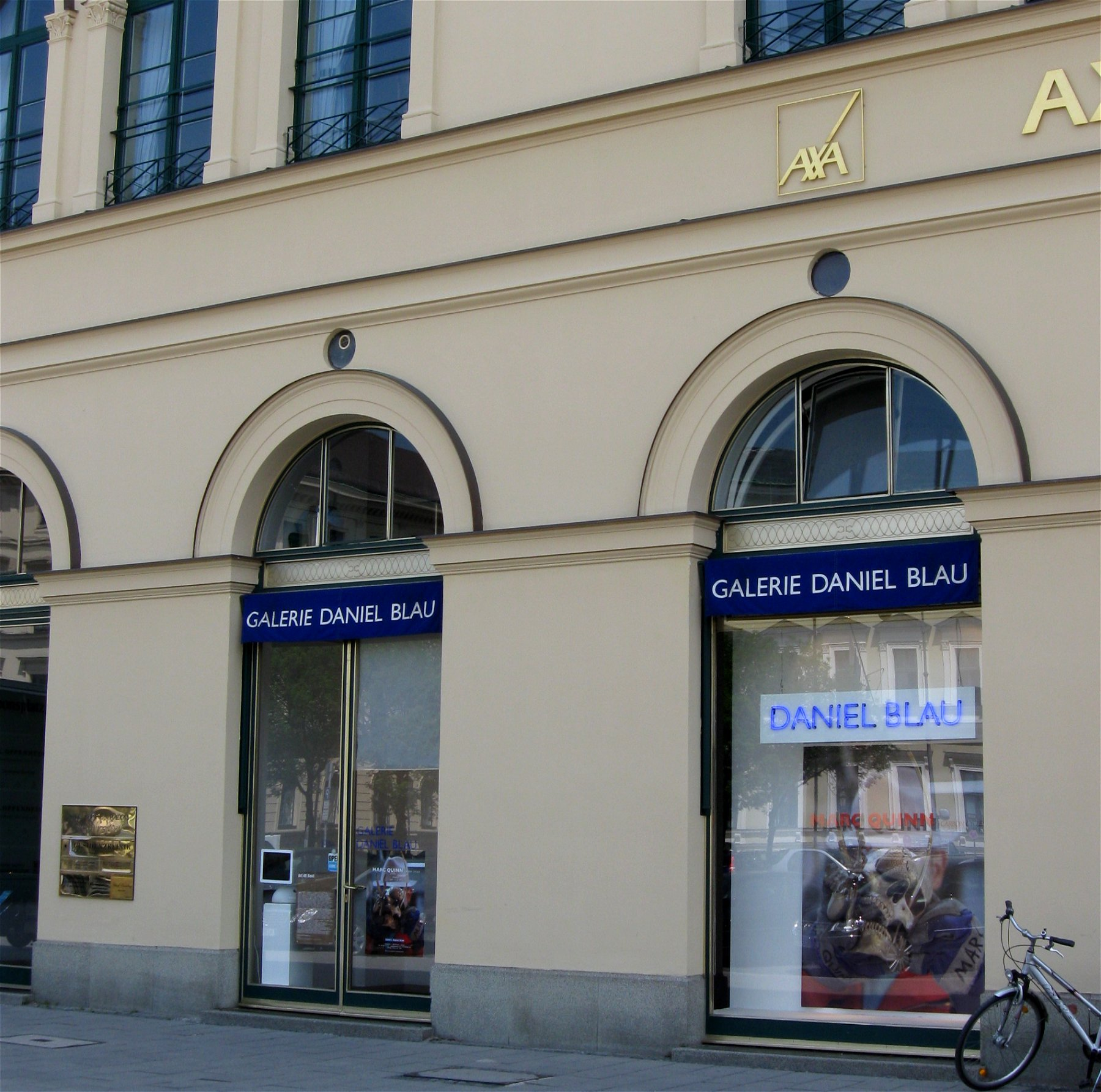 Galerie Daniel Blau, Odeonsplatz in München